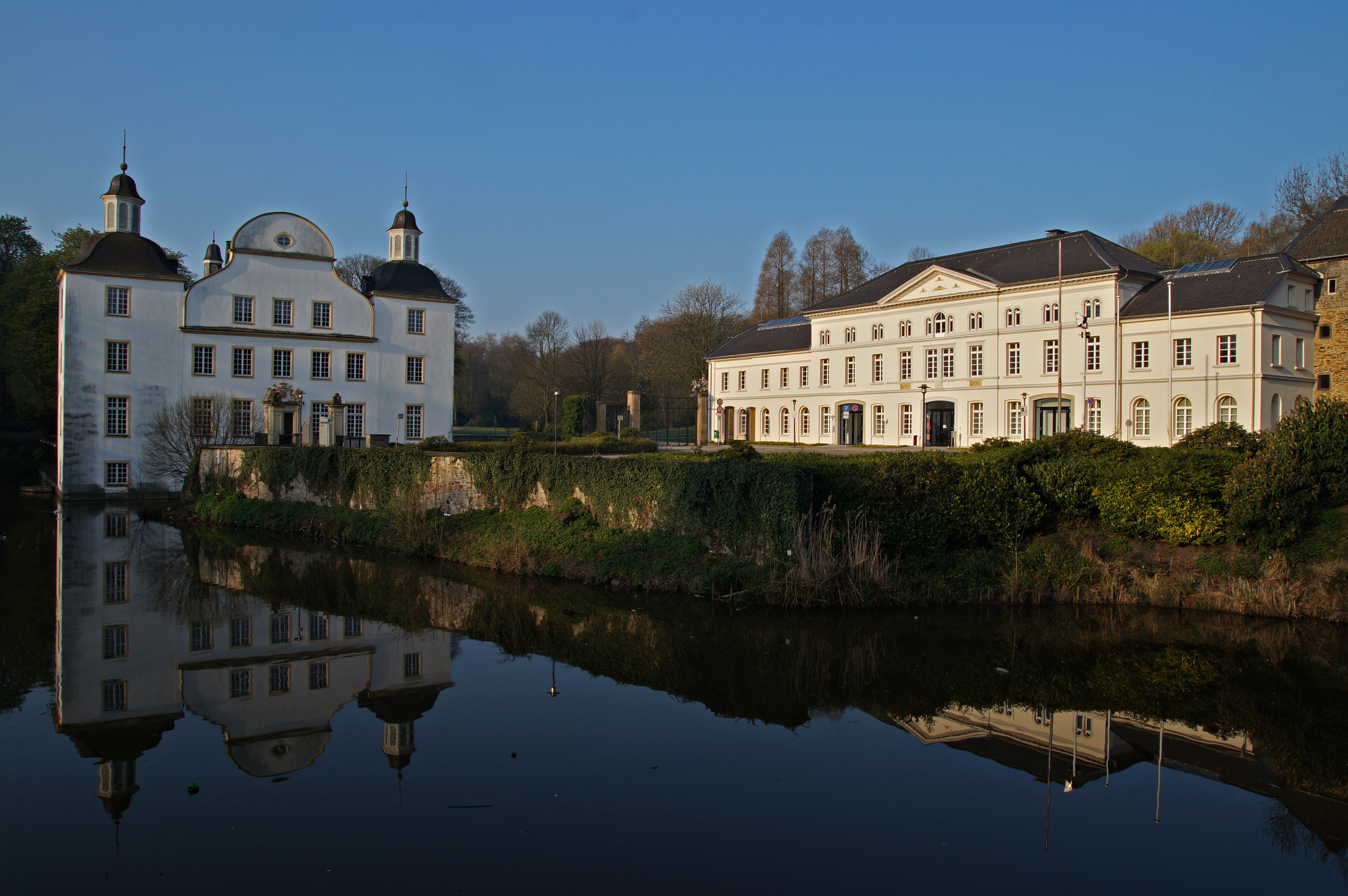 Blick von der Schlossstraße über den Schlossteich